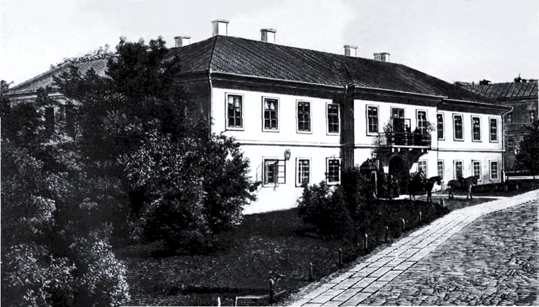 Czernowitz- Ehemalige Militäradministration (1780), sodann Landgericht